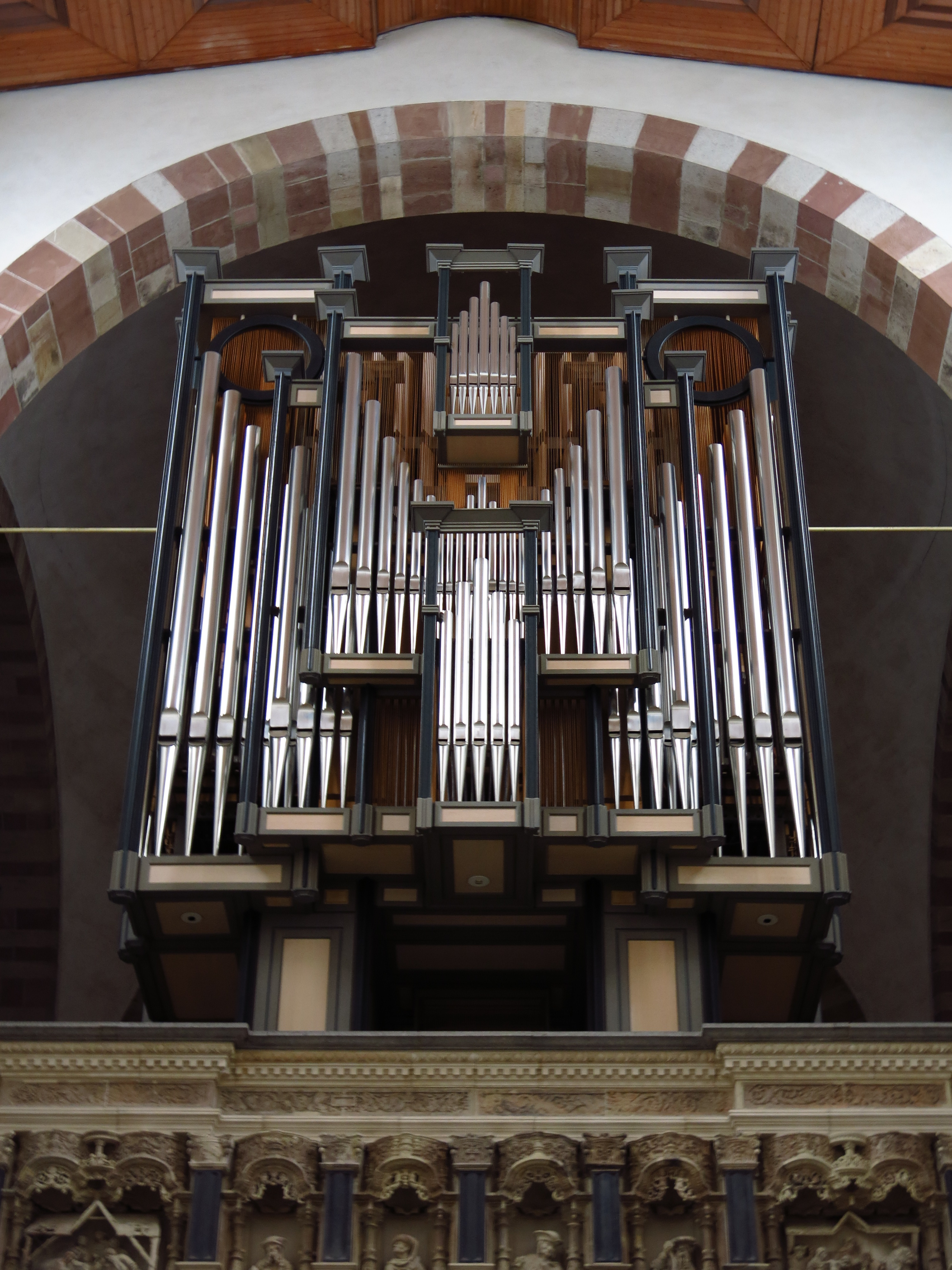 Innenansicht der frühromanischen Basilika St. Maria im Kapitol in Köln.